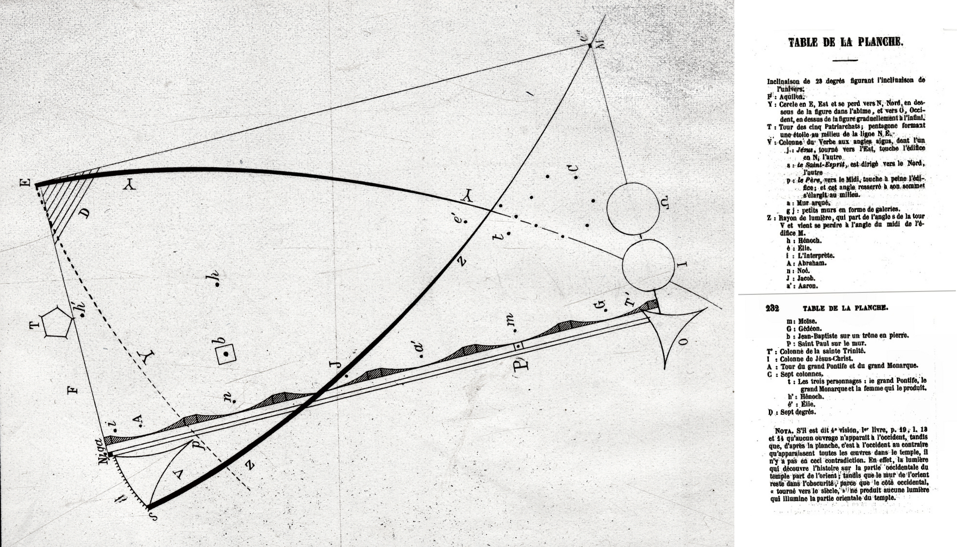 Plan de la Jérusalem Céleste établi par Pierre Lachèze, traducteur de Hildegarde de Bingen (XIIème siècle), d'après ses "visions" (Scivias, Livre III, traduction de 1863) cliché Bibliothèque municipale de Lyon (extrait du document SJ A 402/865)